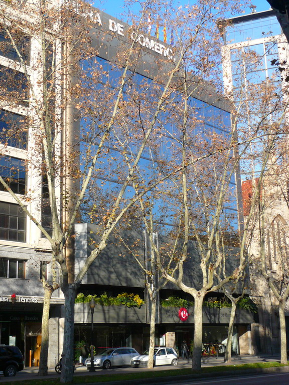 Seu de la Cambra Oficial de Comerç, Indústria i Navegació de Barcelona a l'avinguda Diagonal de Barcelona